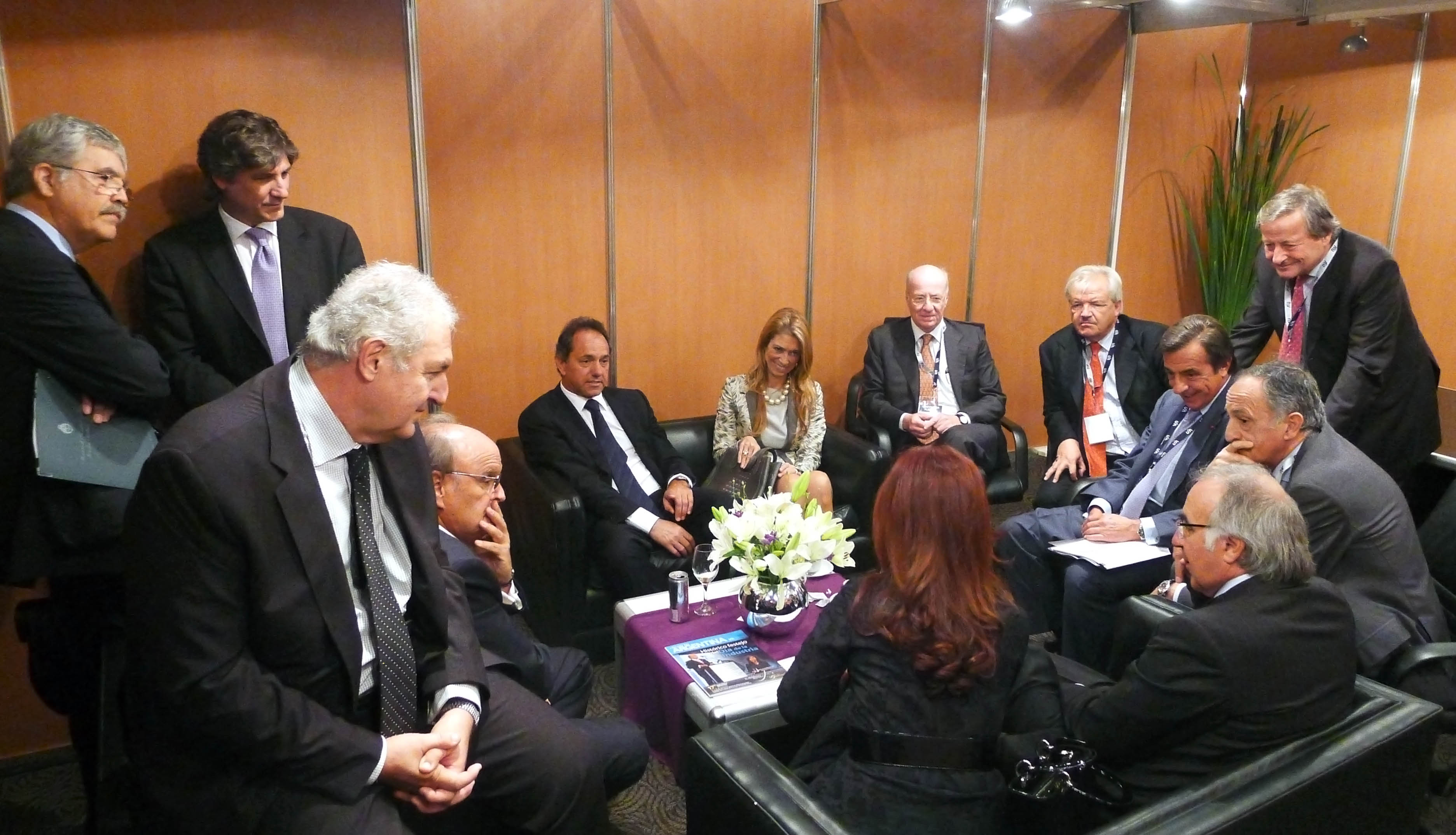 La presidente Cristina Fernández de Kirchner en el Cierre de la conferencia anual de la UIA, en Noviembre de 2011.